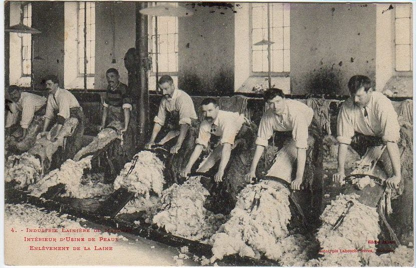 Le travail de la laine à Mazamet. N°624 L'INDUSTRIE LAINIERE COUPAGE DE LA LAINE. EDITEUR LABOUCHE